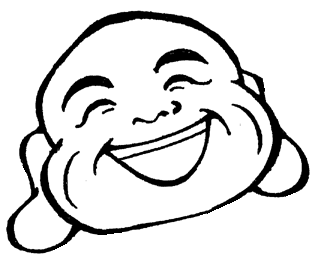 Hotei icon.